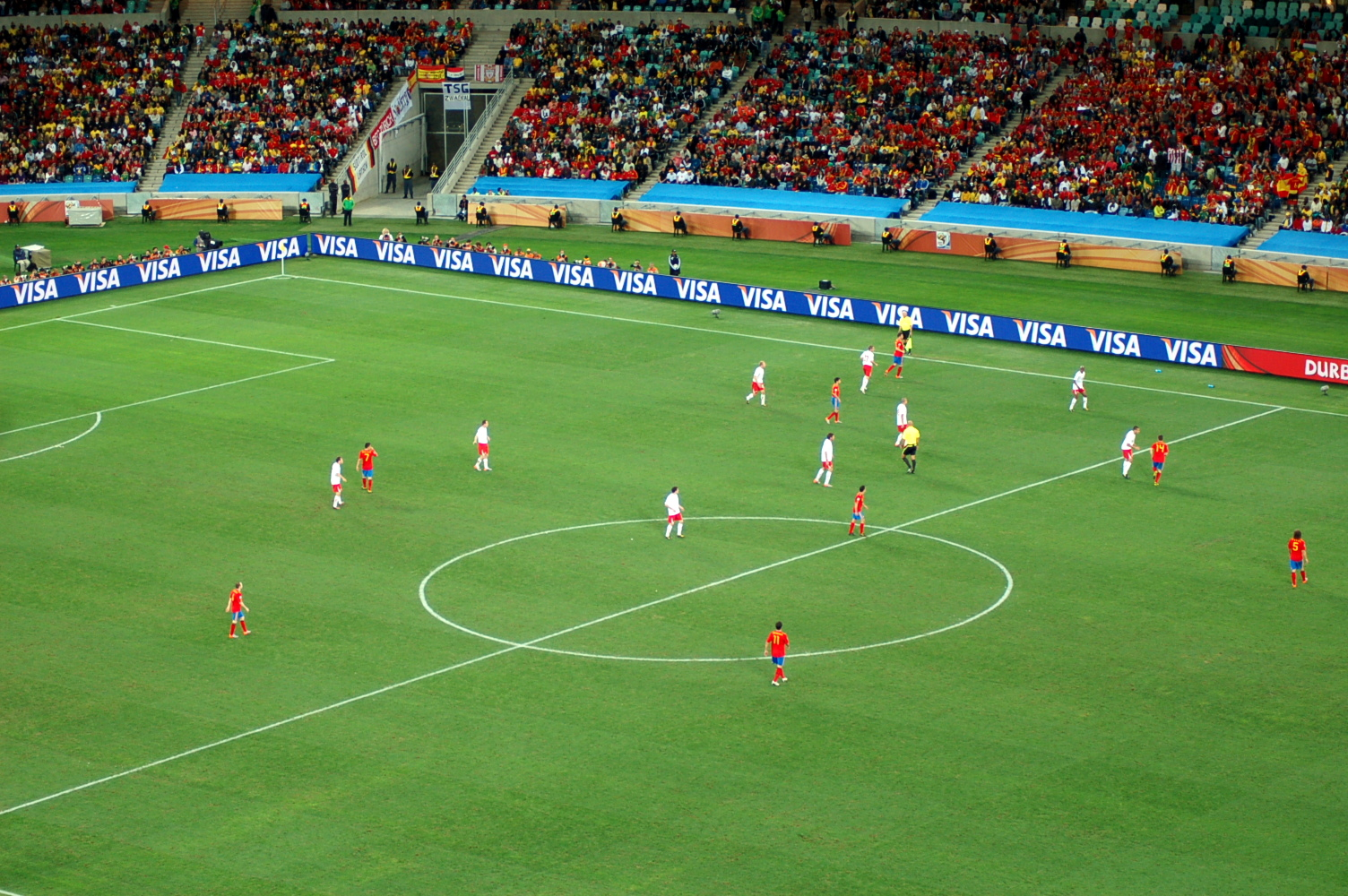 Vista del campo en el partido del Mundial de fútbol 2010, en el enfrentamiento España - Suiza.